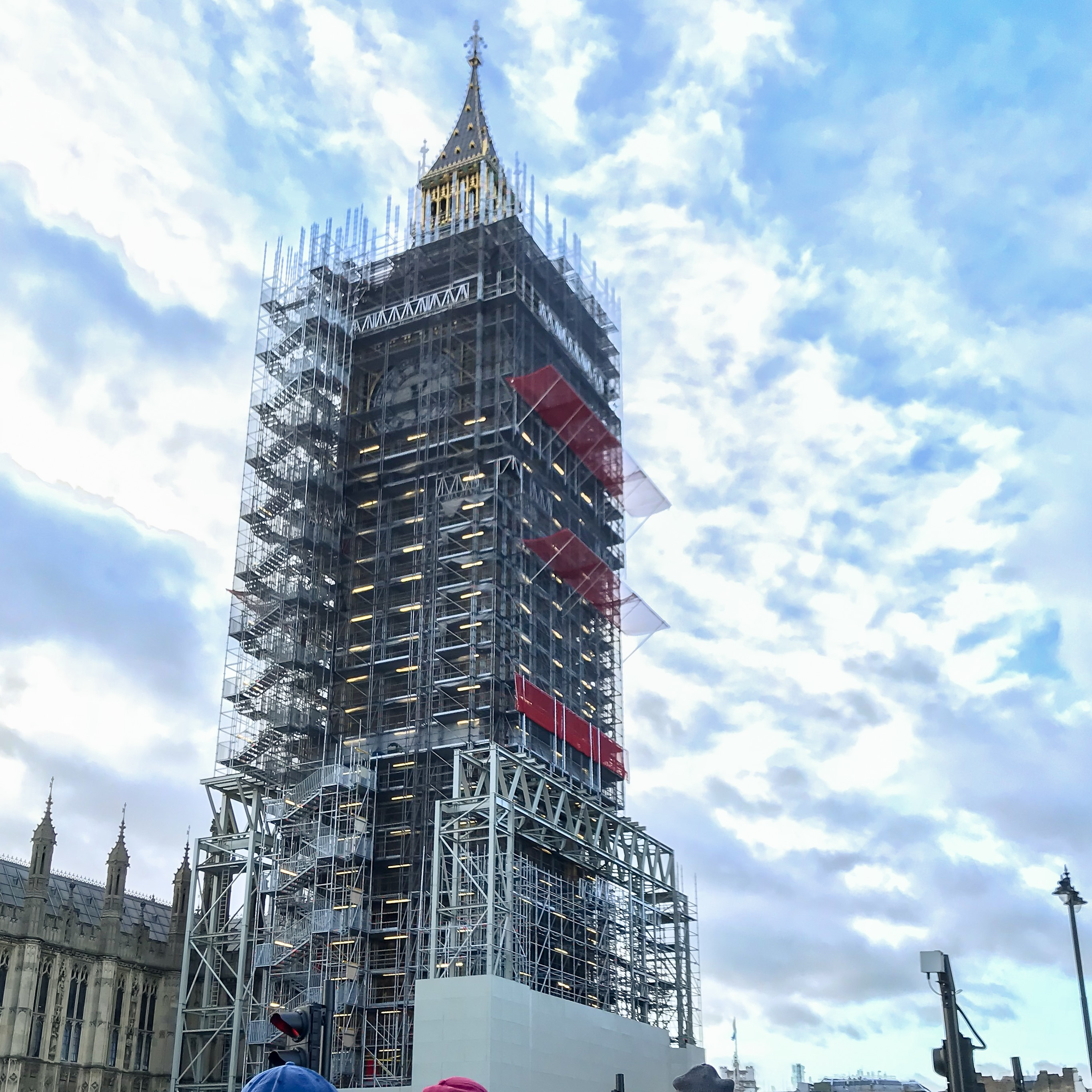 Big Ben korjauksessa joulukuussa 2017